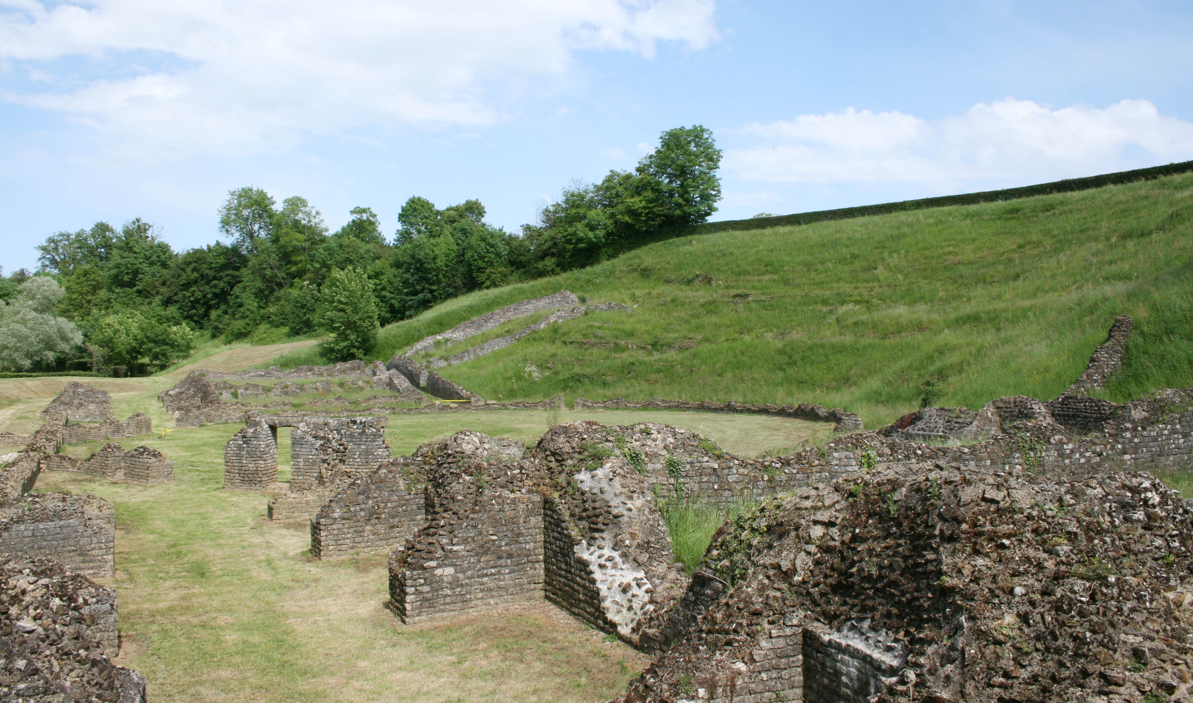 Theatre romain à Sanxay